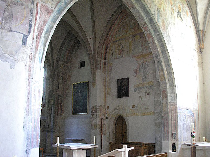 Alte Pfarrkirche St. Martin (Garmisch, Obb.). Blick in den Chor (Südwand). Juni 2006